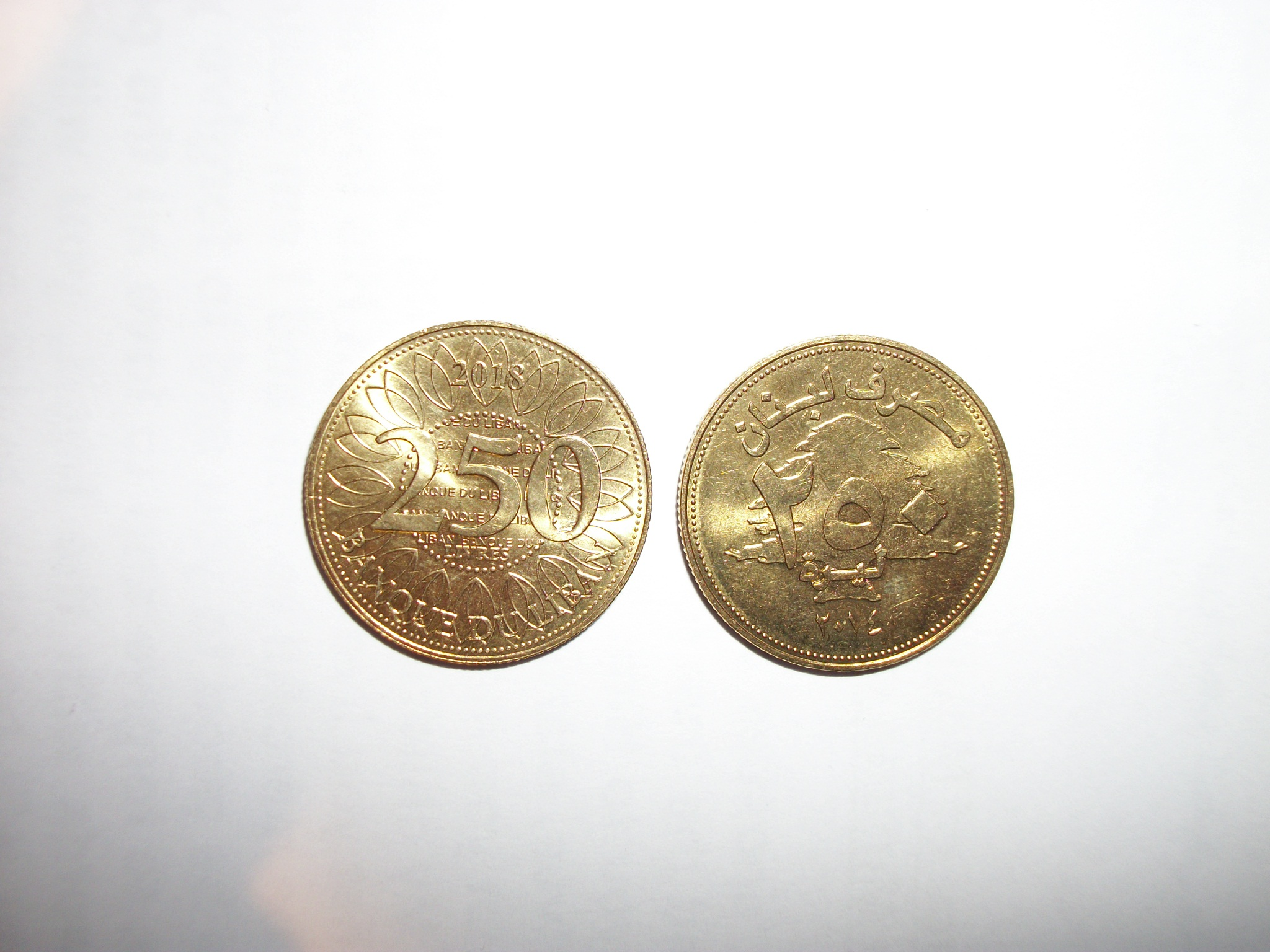 Pièce de 250 livres libanaises